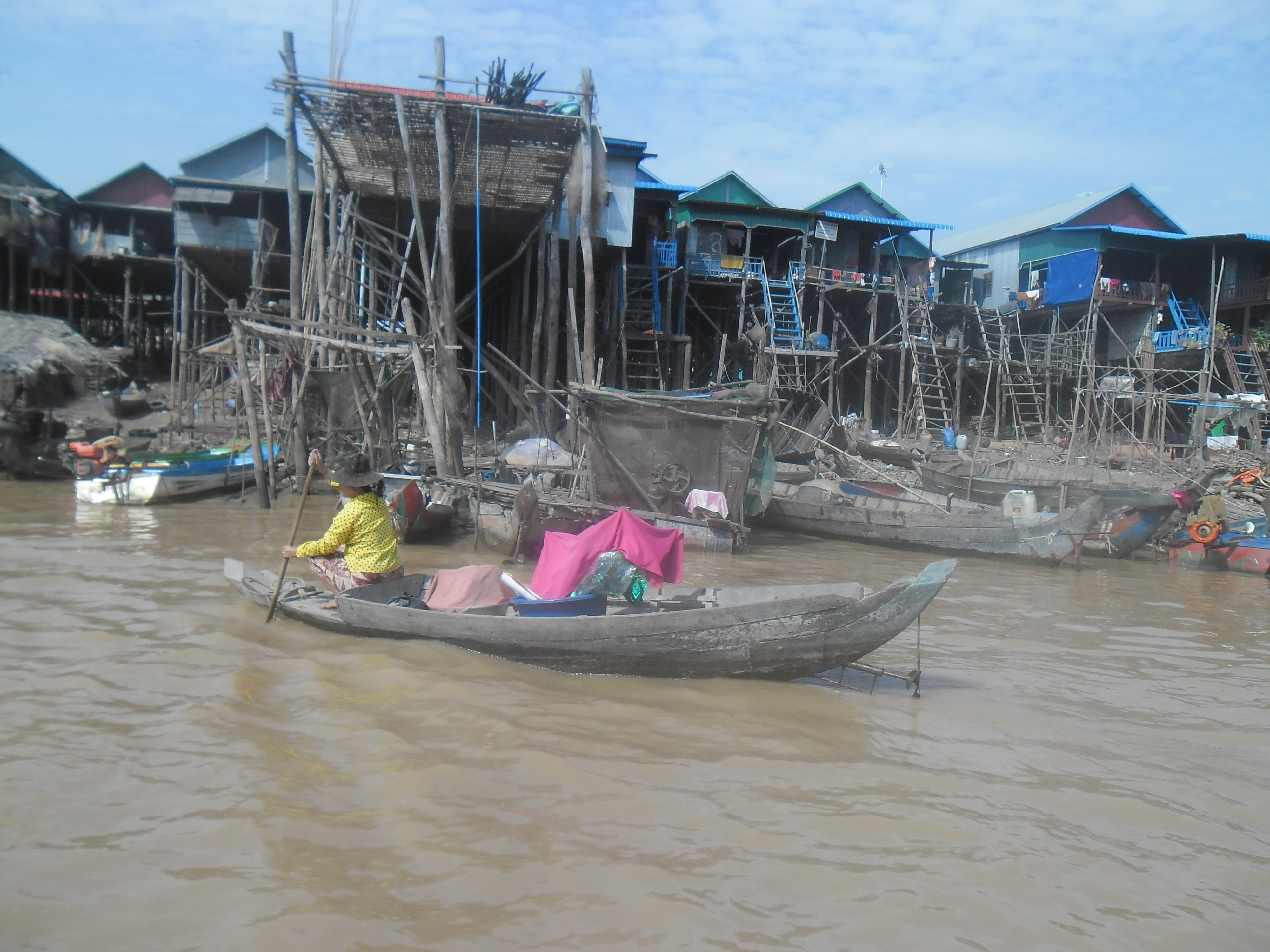 Tonle Sap